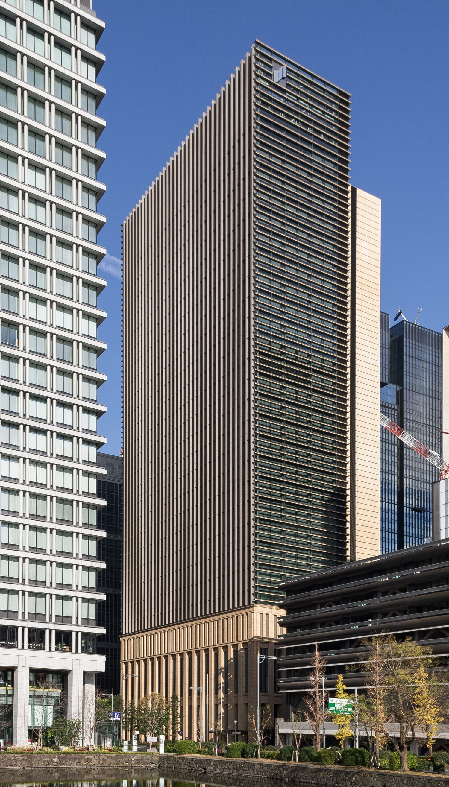 三井住友銀行東館（ライジング・スクエア）